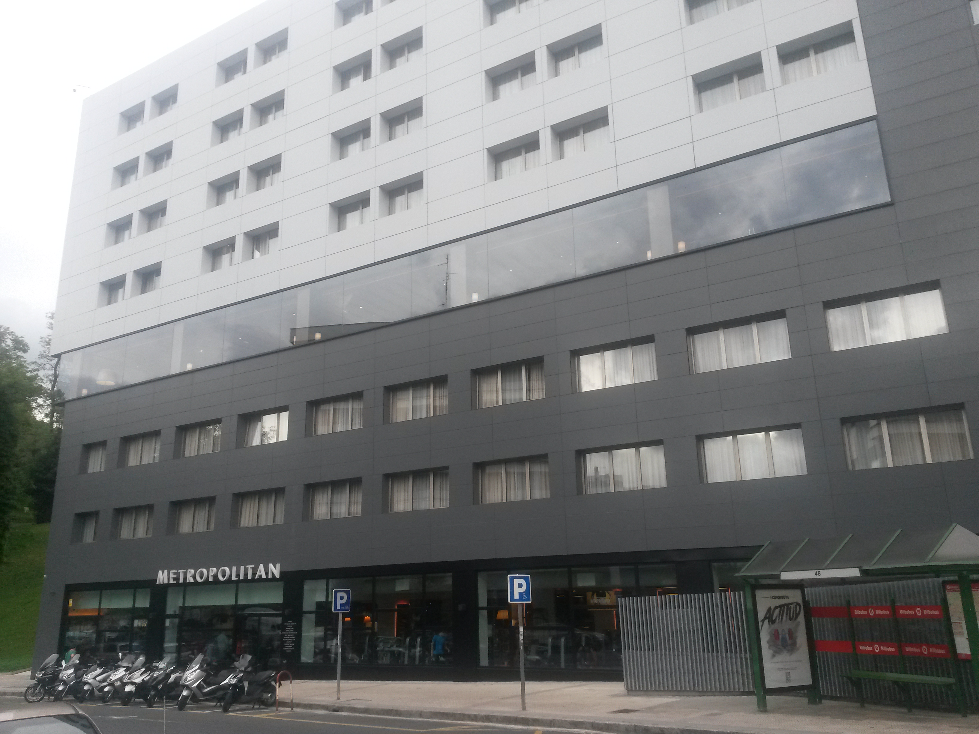 Hotel Holiday Inn Bilbao.